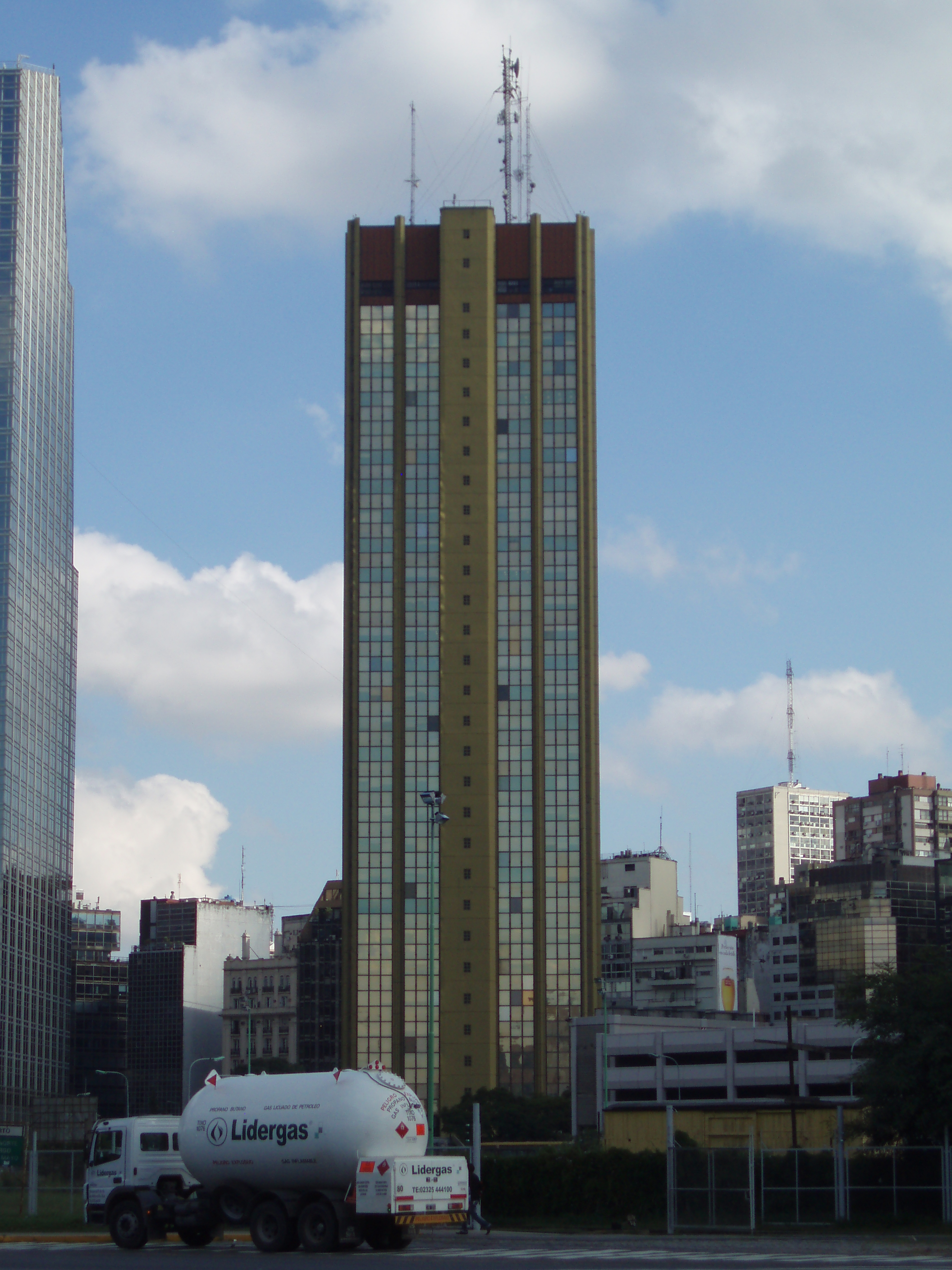 Torre Catalinas Norte desde Av. Moreau de Justo, Buenos Aires